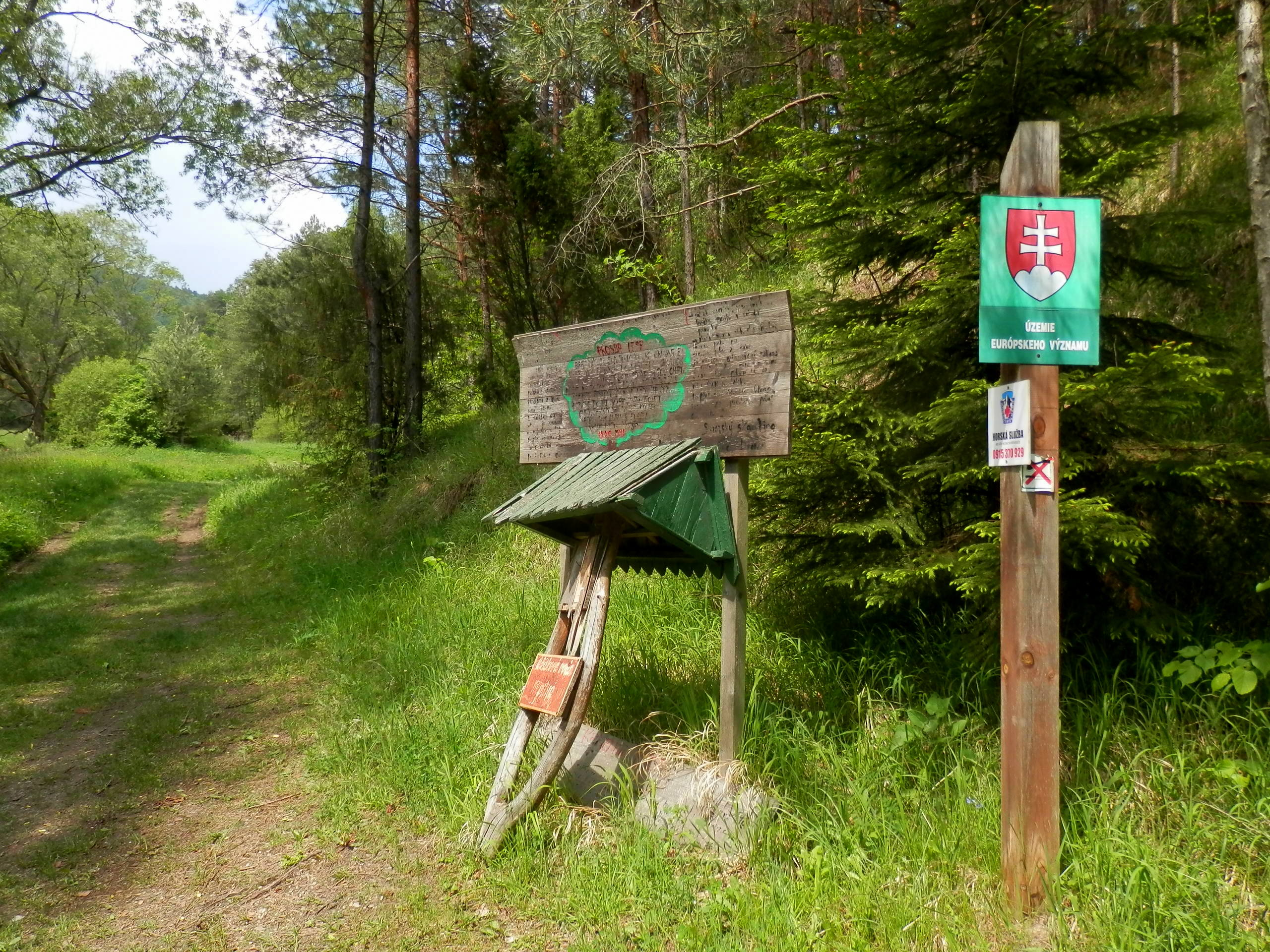 Národná prírodná rezervácia Lačnovský kaňon. Obec Lipovce, okres Prešov.